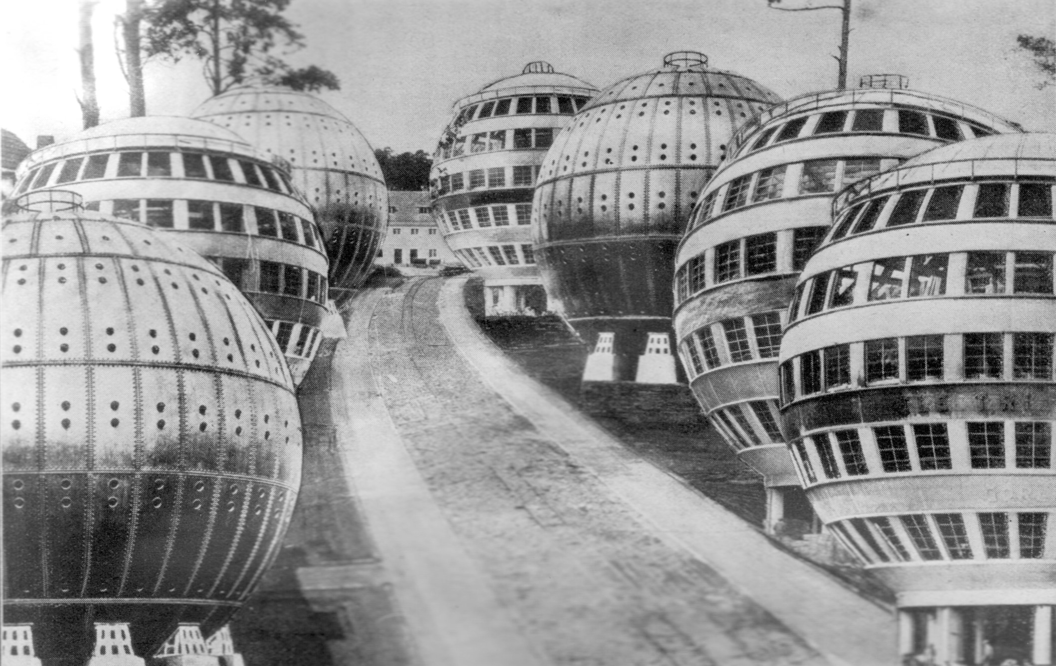 Aprilscherz der Zeitschrift mit der Bildunterschrift: "Kugelhäuser, die neue praktische und gesunde Bauweise. - Die erste Kugelhausstrasse in Dresden, am 1. April dem Verkehr übergeben.